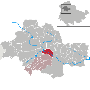 Altengottern in Thuringia - Unstrut-Hainich-Kreis